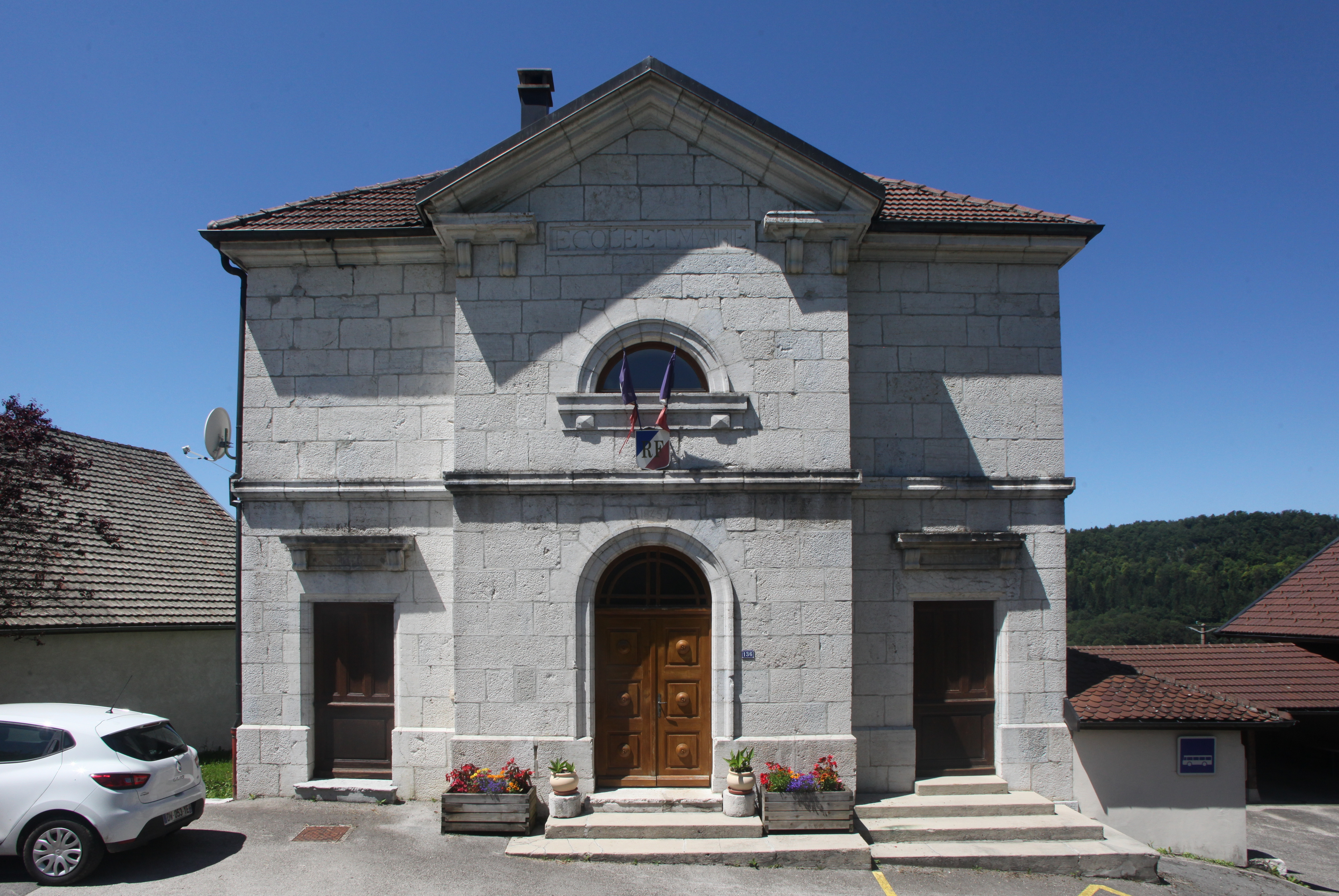 Mairie de Crans (Jura).